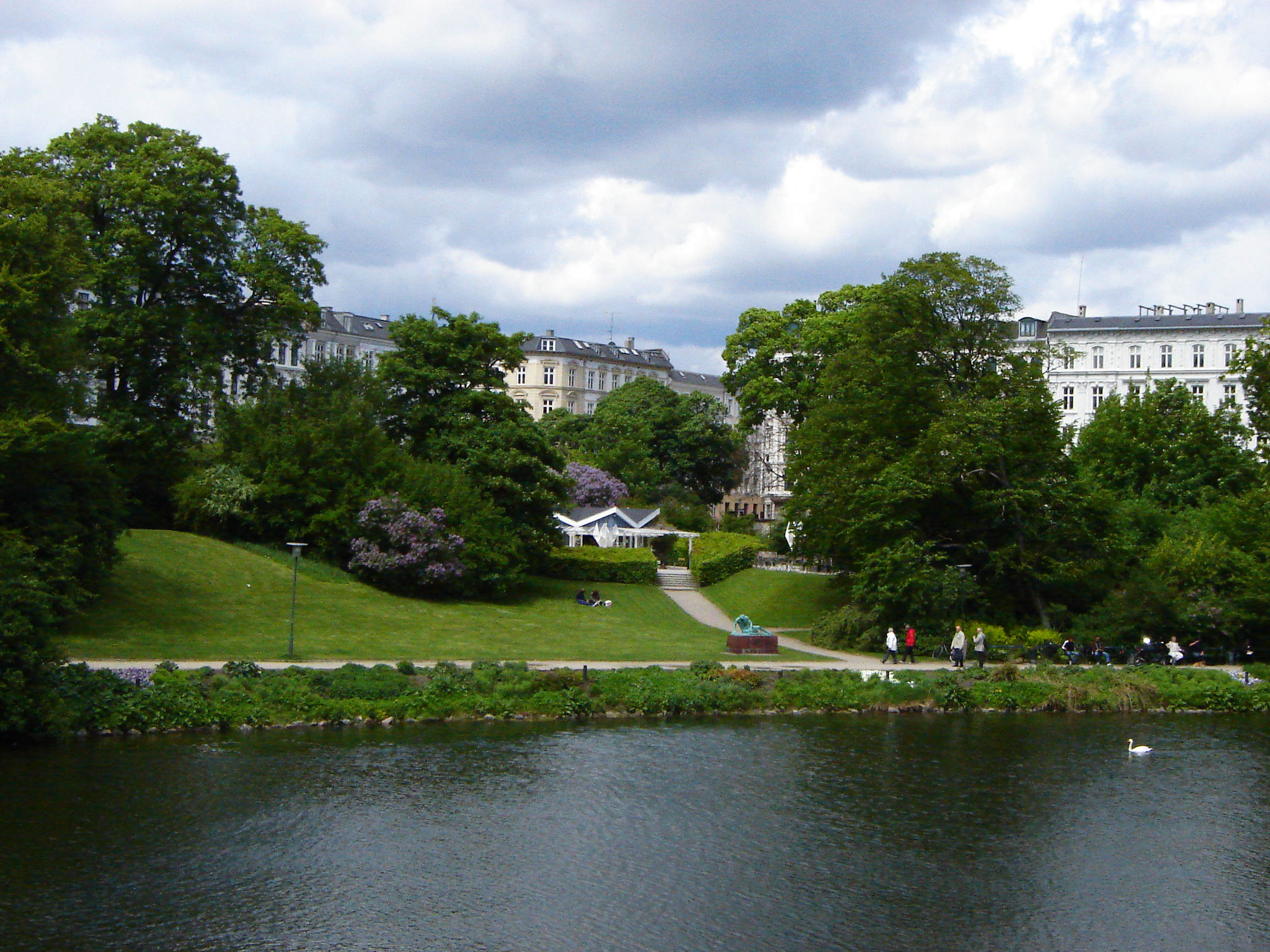 The caf'e pavillion in Ørstedsparken in Copenhagen, Denmark